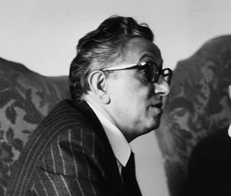 Nicola Cilento